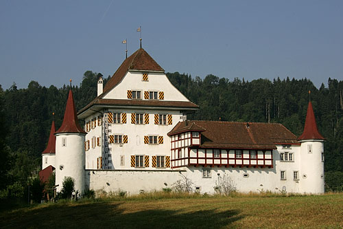 Schloss Wyher bei Ettiswil